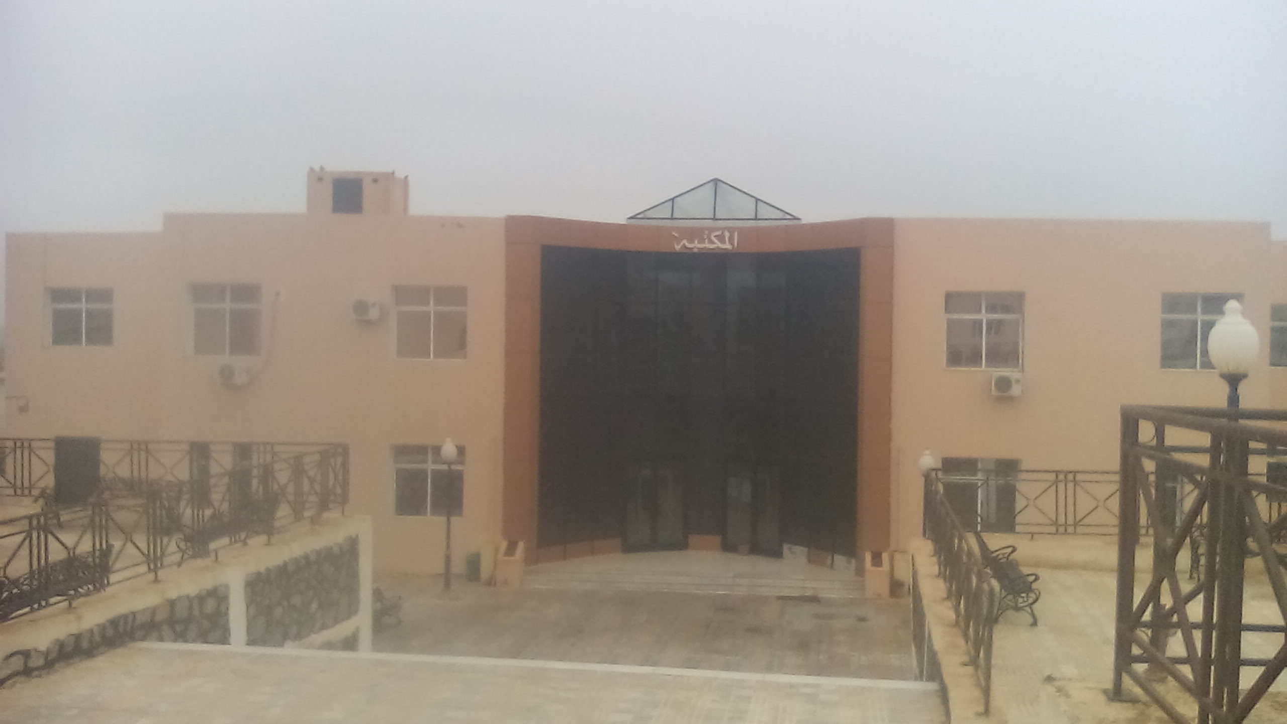 Infrastructure de la faculté fgca